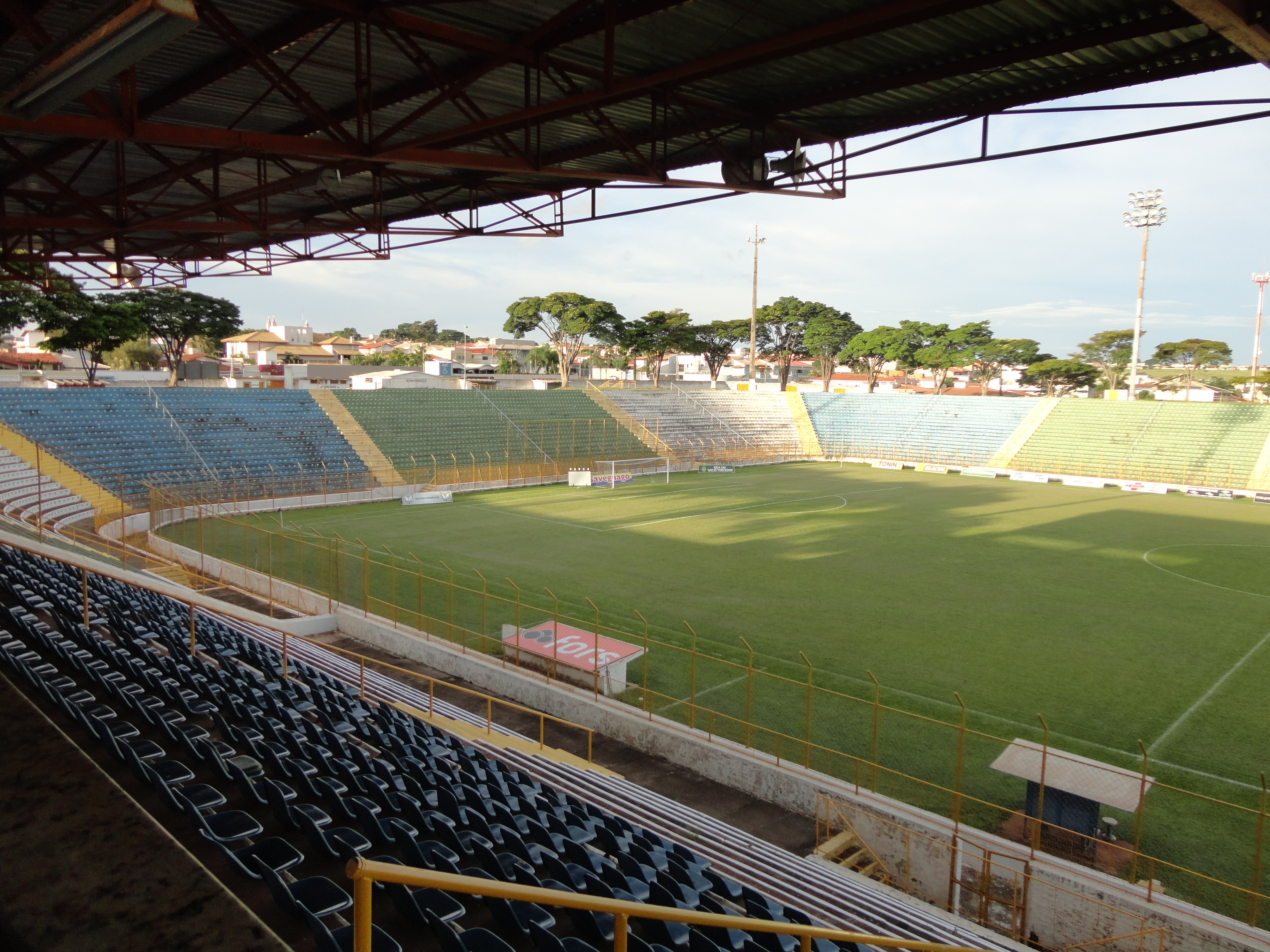 Foto do estádio municipal José Lancha Filho, em Franca